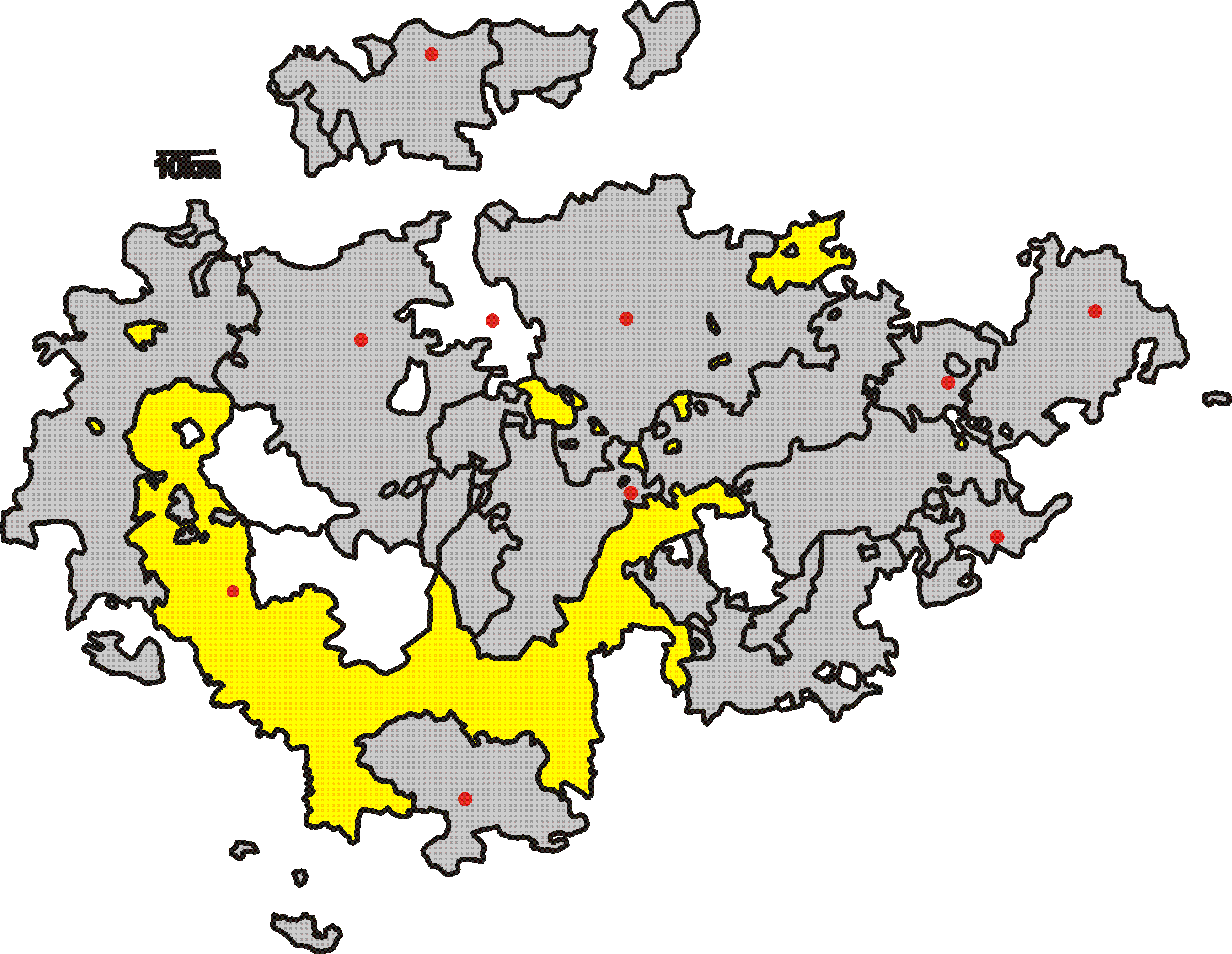 Karte Thüringen 1900 mit Herzogtum Sachsen-Meiningen